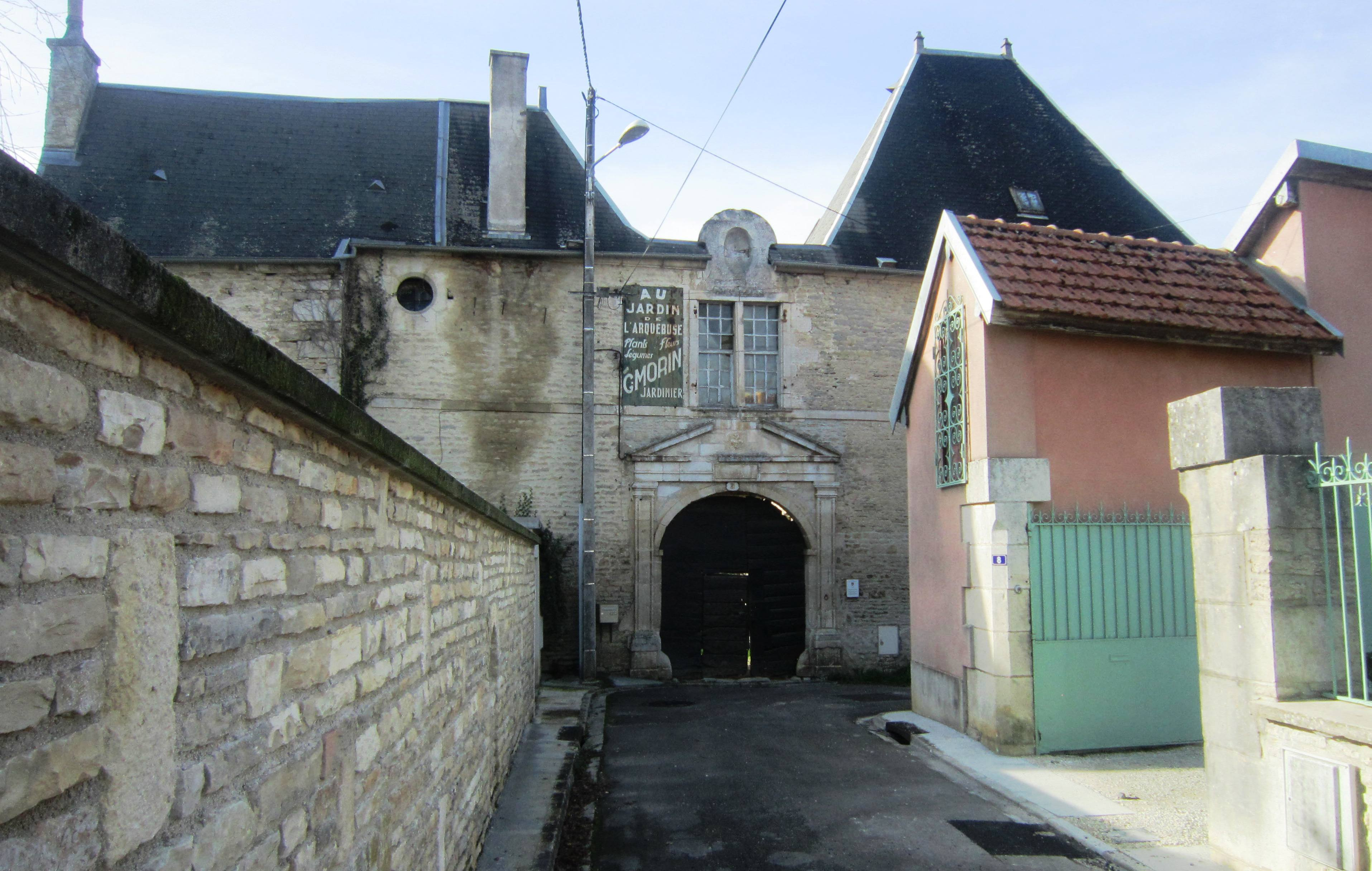 La maison des arquebusiers Châtillon-sur-Seine